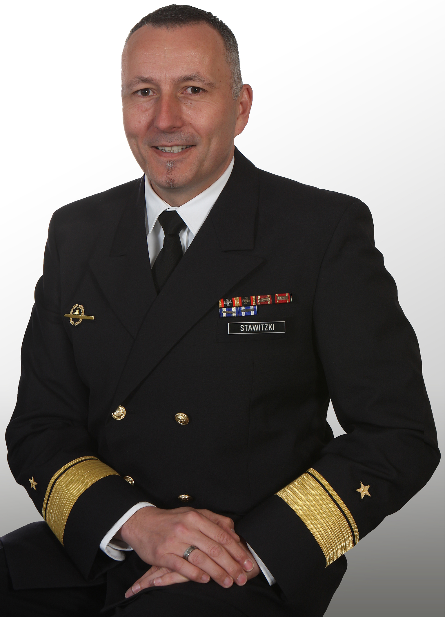 Porträtfotografie von Flottillenadmiral Carsten Stawitzki.